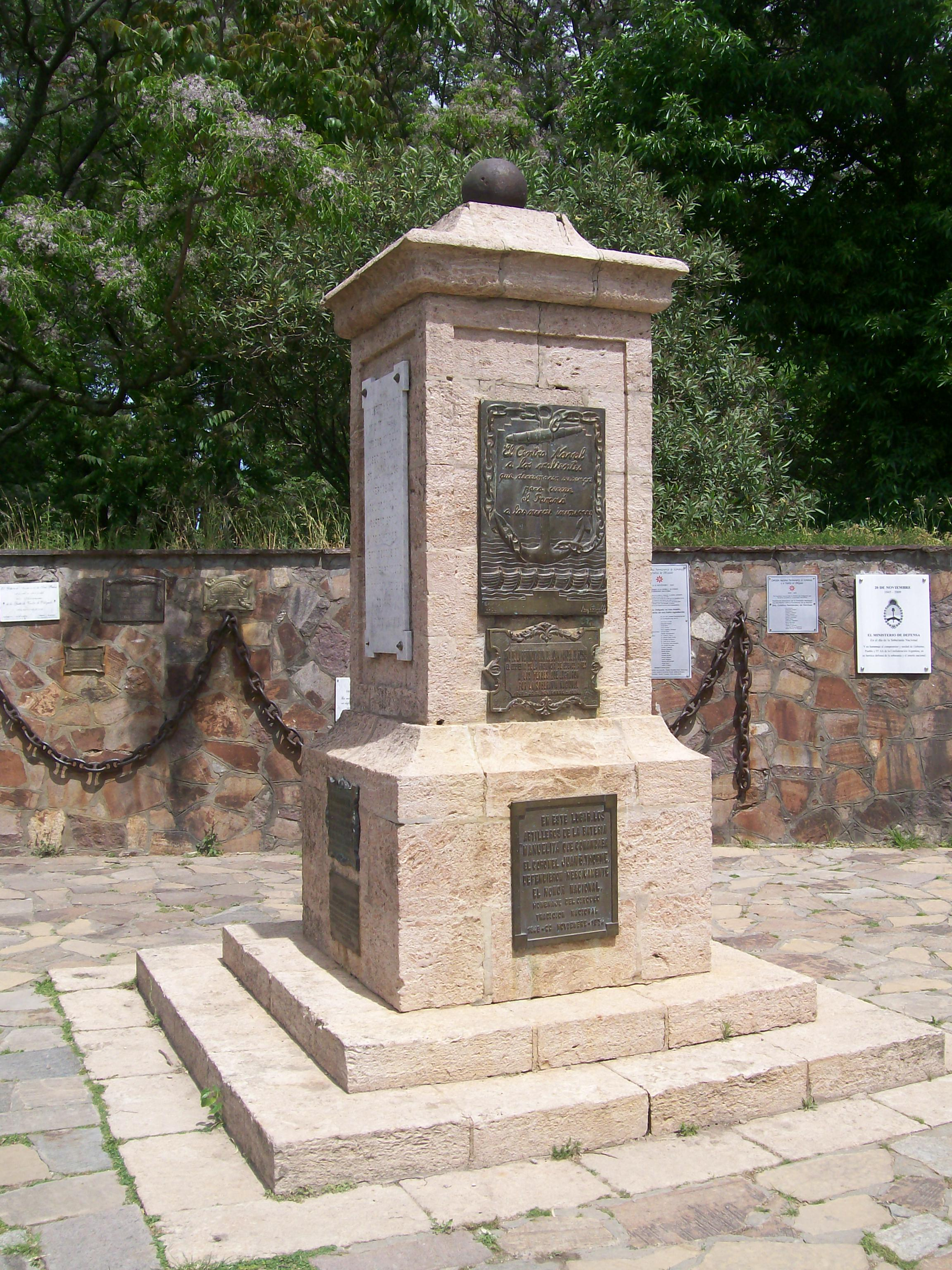 monumento por Vuelta de Obligado